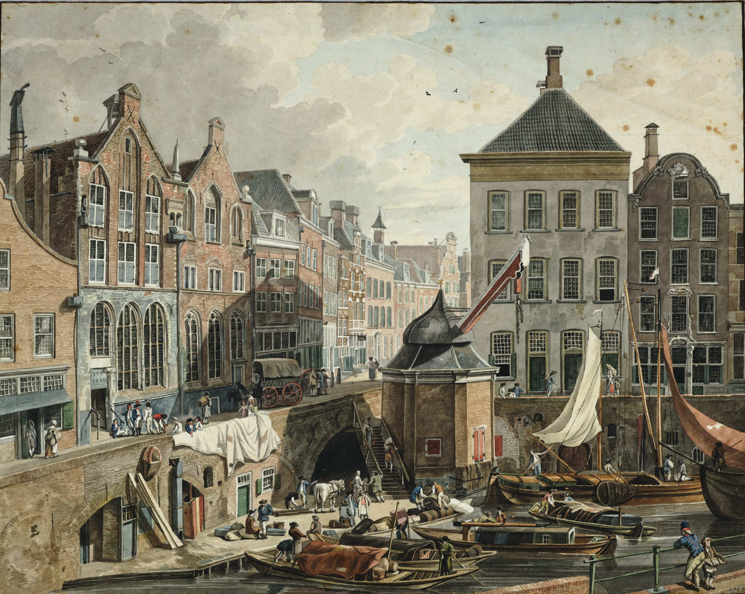 De grote stadskraan rond 1800 in de Utrechtse binnenstad aan de Oudegracht/Ganzenmarkt. Binnenin bevond zich een tredrad. Zichtbaar in de afbeelding direct achter de stadskraan (het witte pand) Keyserrijk met de waag (onderdeel van het huidige Utrechtse stadhuis). Achter de stadskraan bevindt zich een overkluisde wed (schuin oplopende weg van de kade naar de bovenliggende straat).